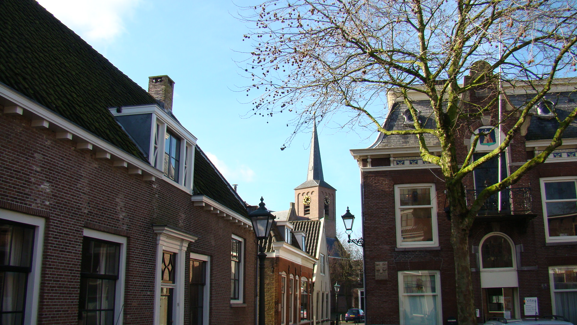 zwammerdam